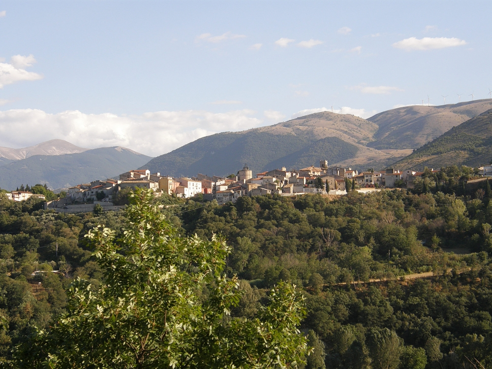 Raiano